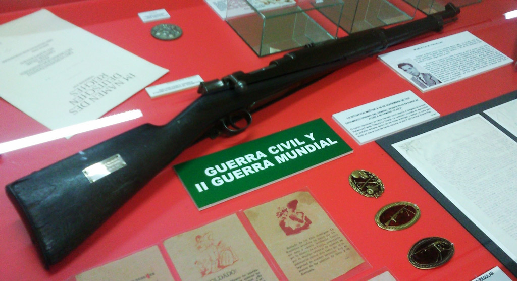 Fusil de Foucellas de 1952, no Museo Militar da Coruña